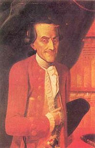 Retrato de Gregorio Mayans y Siscar (1699-1781)